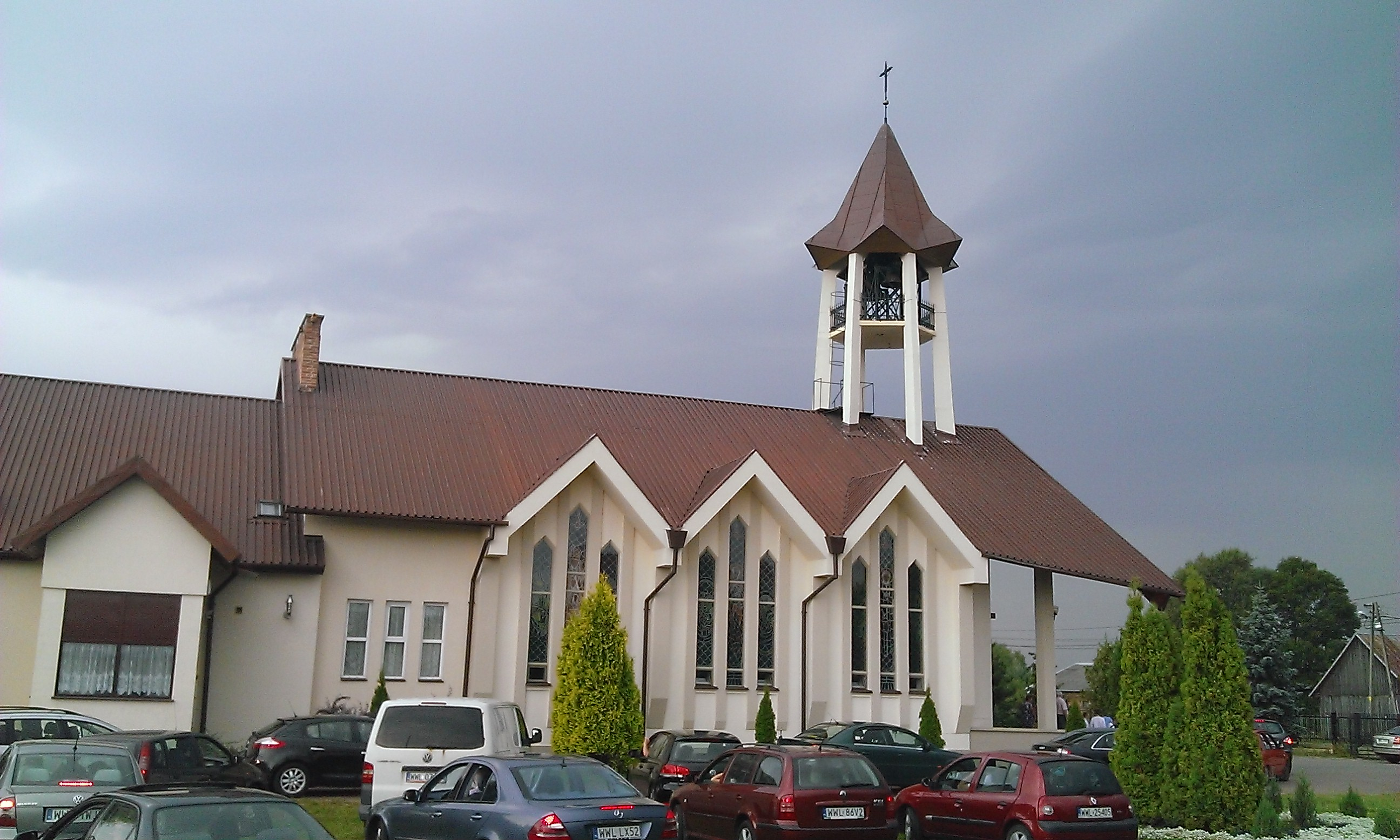 Wola Rasztowska (gm. Klembów, pow. Wołomin) - kościół Św. Apostołów Piotra i Pawła